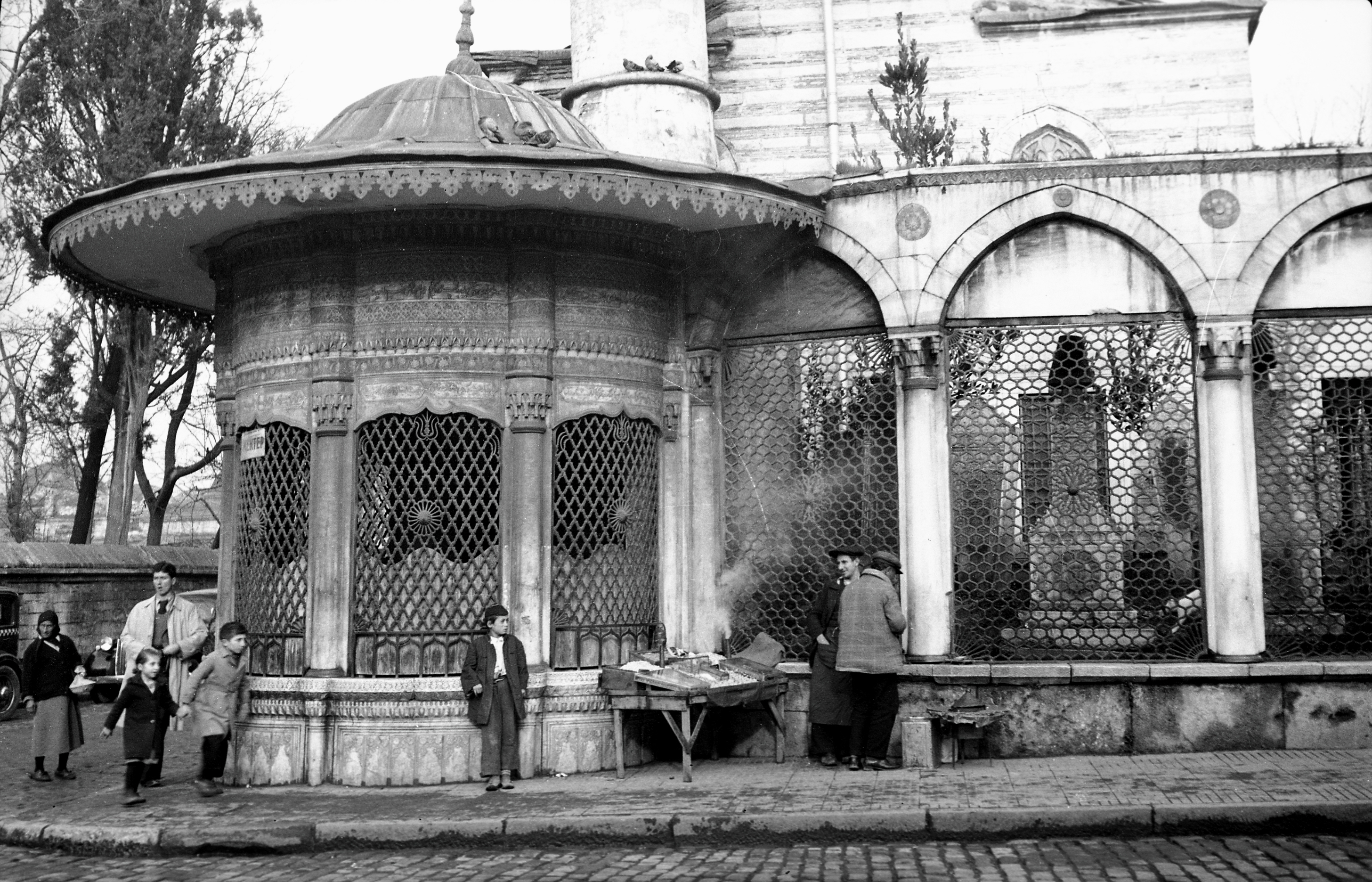 The Damat İbrahim Paşa Complex in Şehzadebaşı, Vefa, was built on the order of Nevşehirli Damat İbrahim Paşa in 1720 as a library and a high level madrasa. The building containing classrooms was later converted into a mosque and a minaret with a single balcony was added. The mosque, fountain, library and graveyard are located in a courtyard, which is enclosed by the rooms of the madrasa. The architecture of the complex hosts characteristics typical of the 18th century Tulip Era, including floral ornamentations and baroque details. SALT Research, Ali Saim Ülgen Archive Vefa’da, Şehzadebaşı Caddesi’nde yer alan Damat İbrahim Paşa Külliyesi, Nevşehirli Damat İbrahim Paşa tarafından kütüphane ve darülhadis medresesi olarak 1720’de inşa ettirildi. Darülhadisin dershane olarak kullanılan binası daha sonra camiye çevrildi ve hâlen mevcut olan tek şerefeli minaresi eklendi. Külliyenin cami, sebil, kütüphane ve mezarlıktan oluşan binaları bir avlu içinde dizilidir. Medrese odaları avluyu U biçiminde çevreler. Külliye binaları, çiçek motifli süslemeleri ve barok detaylarıyla 18. yüzyıl Lale Devri mimarisinin tipik örneklerindendir. SALT Araştırma, Ali Saim Ülgen Arşivi